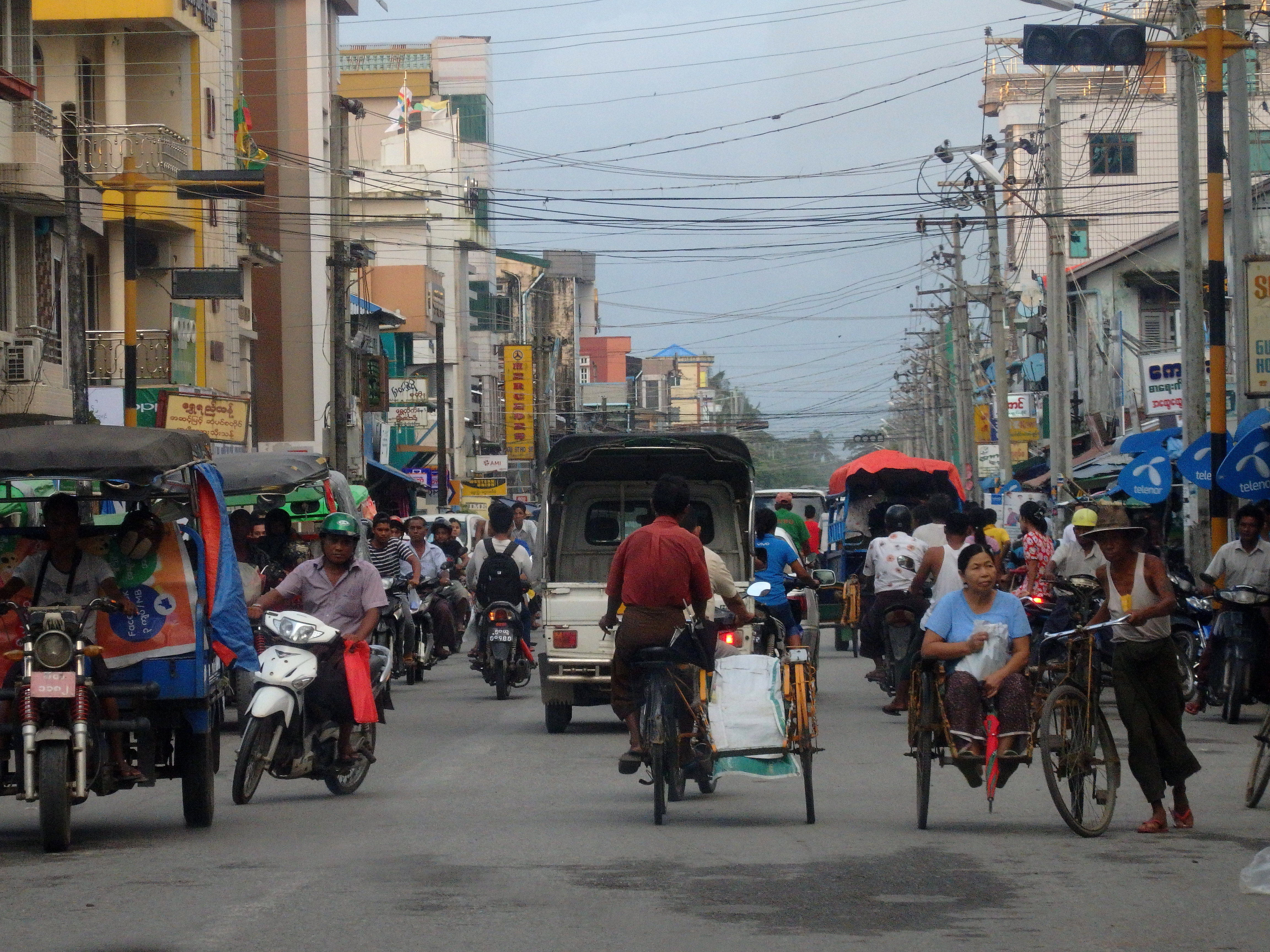 Sittwe, Myanmar (Burma)